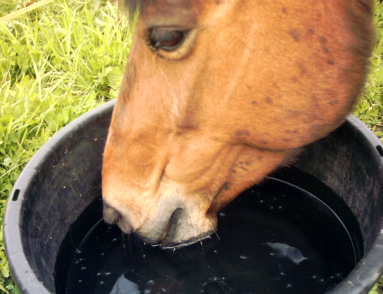 Lewitz-Pony „Anna“ an der Tränke